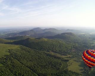 Chaîne des puys vue de mongolfière